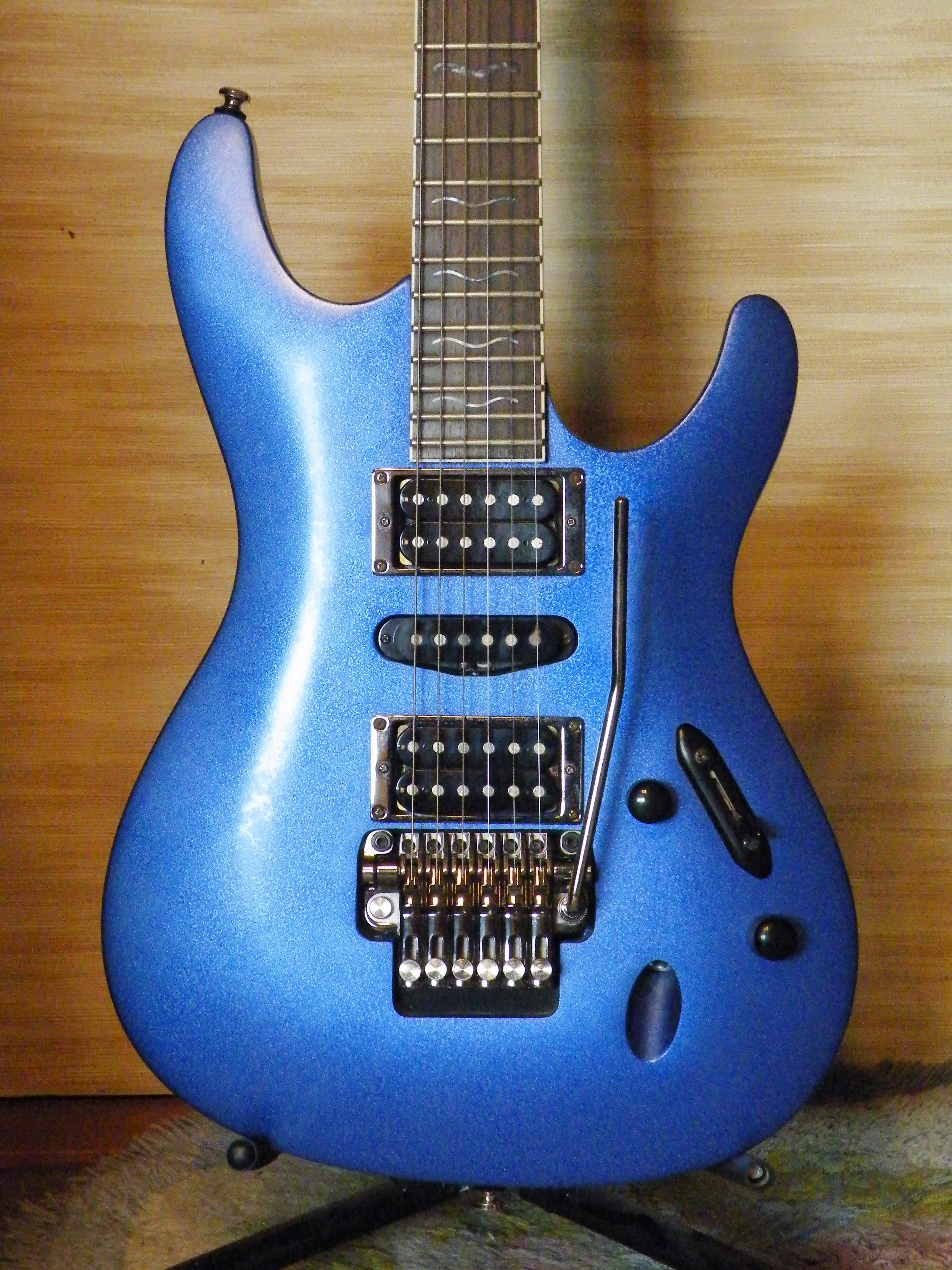 Ibanez S470DX